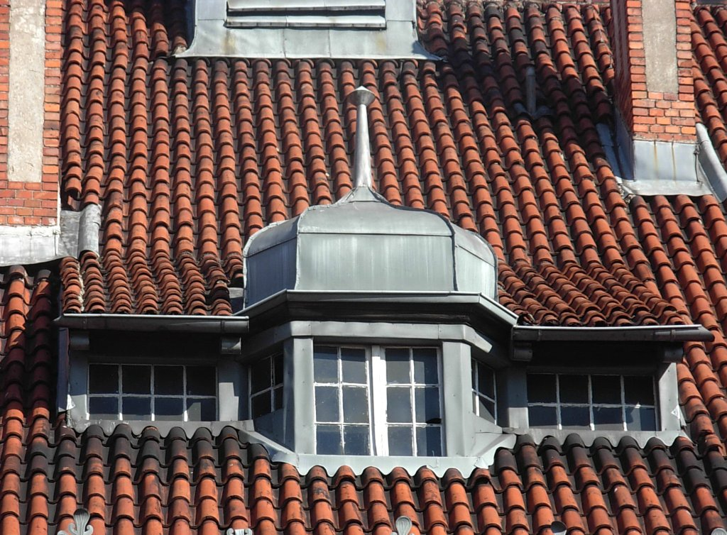 Instytuty Rolnicze w Bydgoszczy